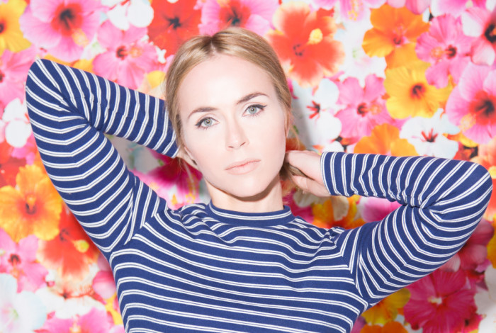 Foto av: Halina Sjuve